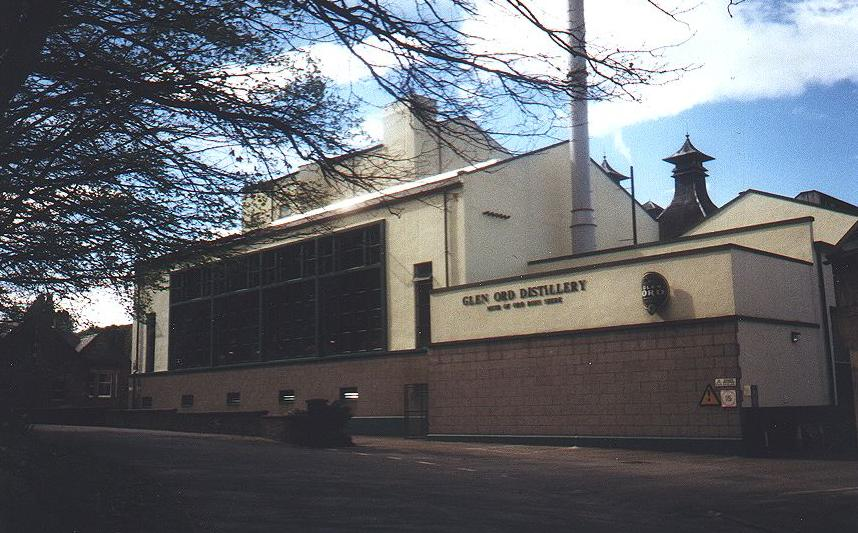 Stillhouse der Glen Ord Whiskybrennerei, Muir of Ord, Ross-shire, Schottland. Selbstphotographiert im April 2002. GFDL.